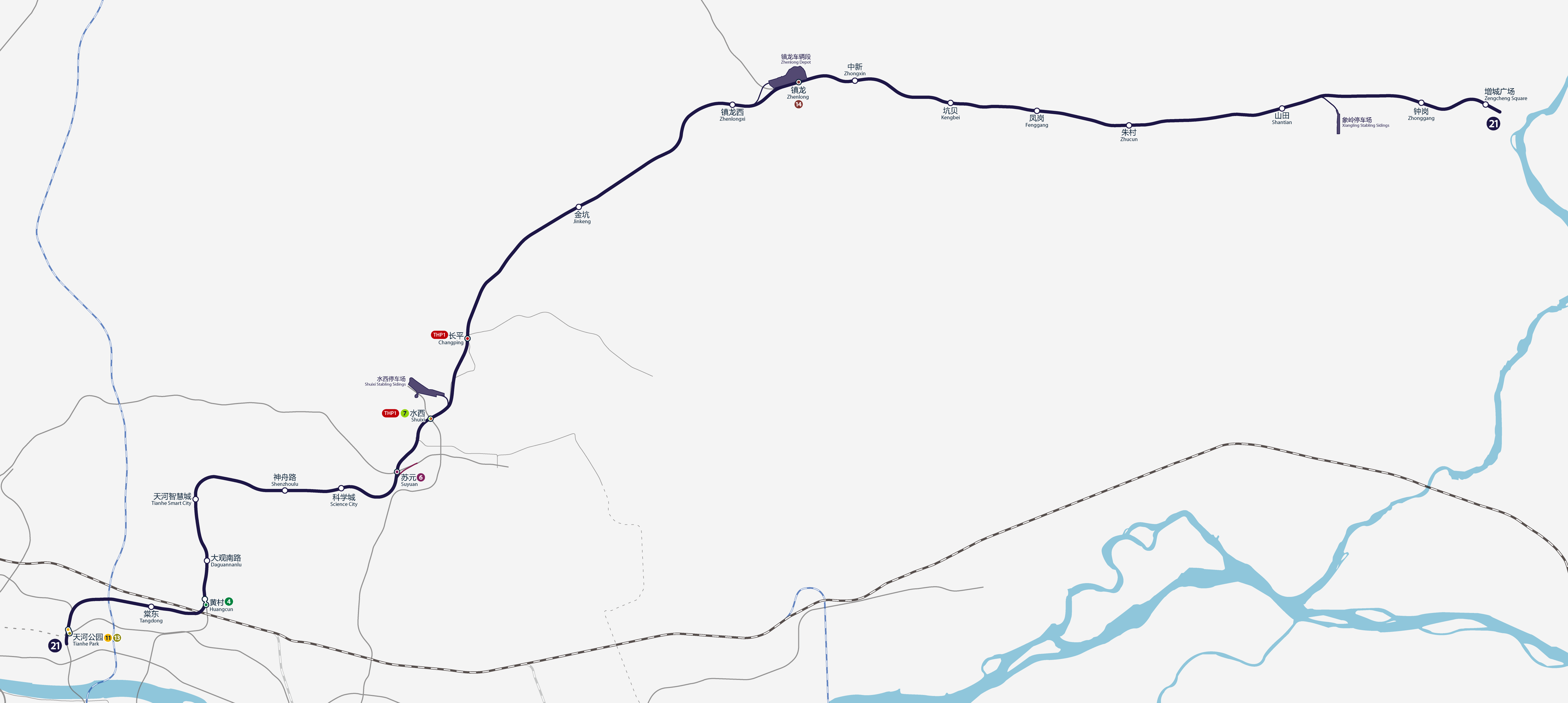 廣州地鐵21號線路線圖，按真實走向比例繪畫